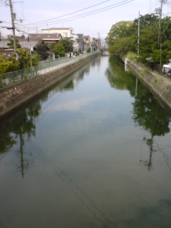 京阪電気鉄道深草駅近くにて撮影の琵琶湖疏水の様子